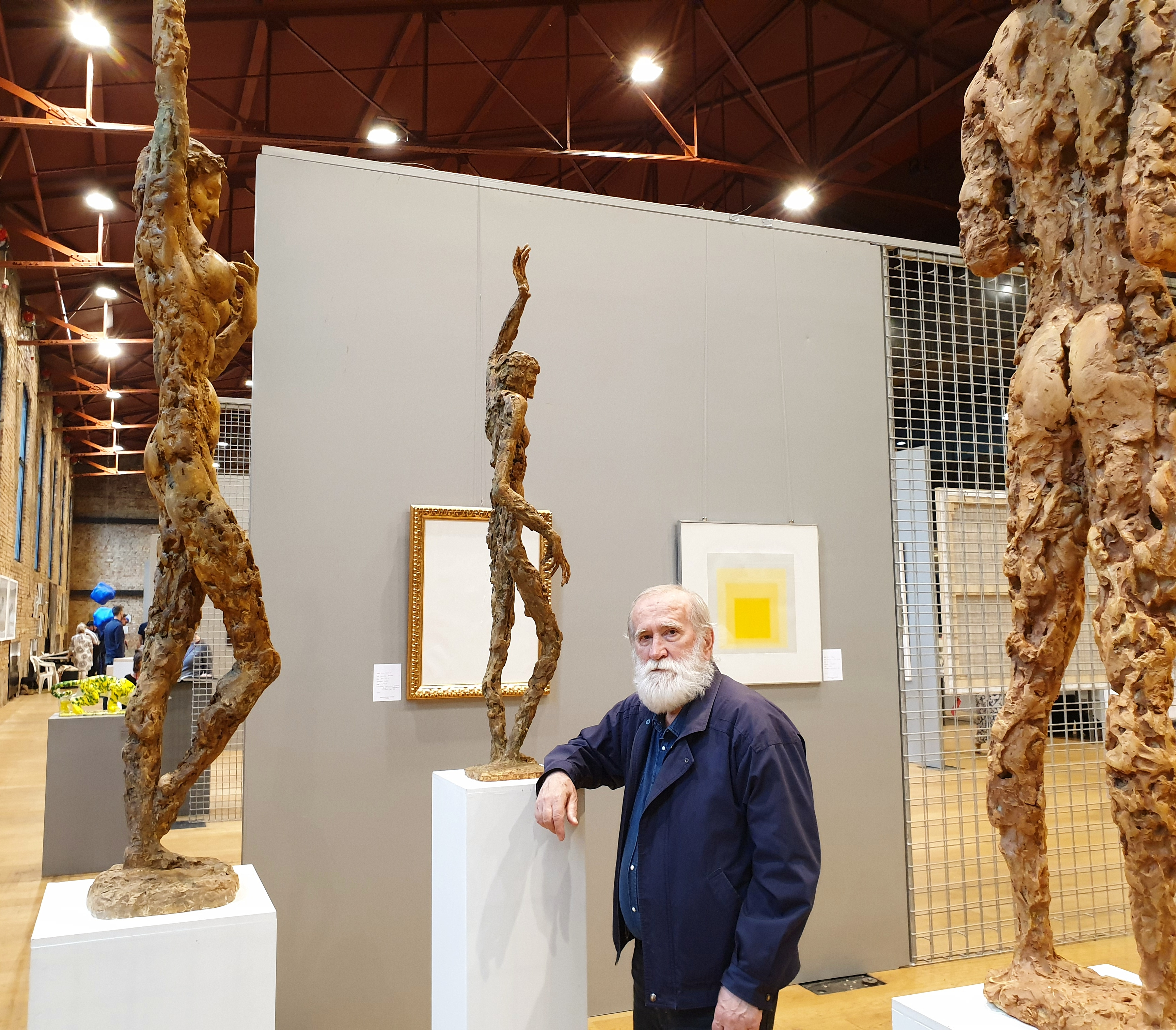 "NESVRSTANI - Boutique Art Fair 2019", Lauba, Zagreb